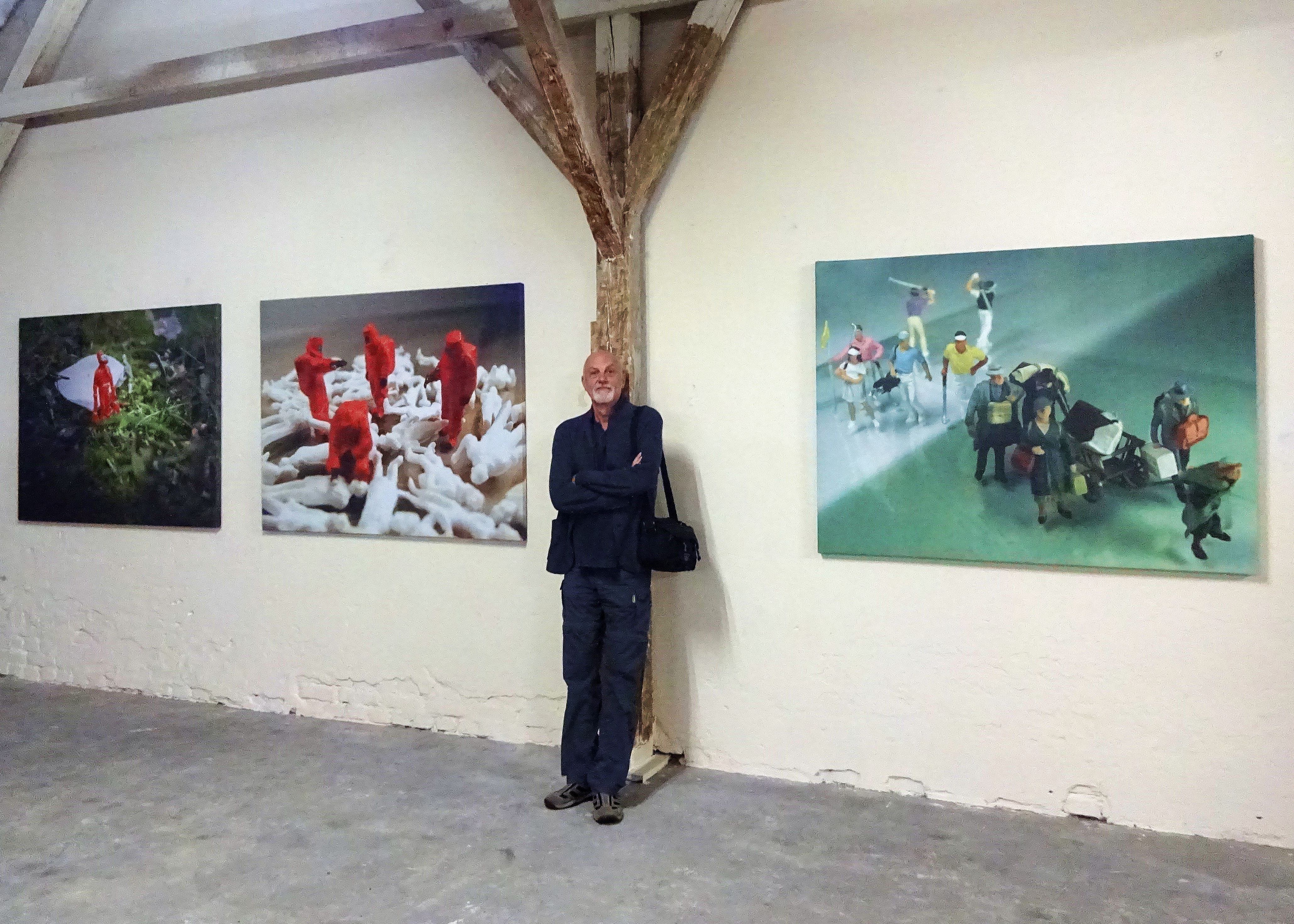 Pit Kinzer auf der Ostrale 2016 in Dresden